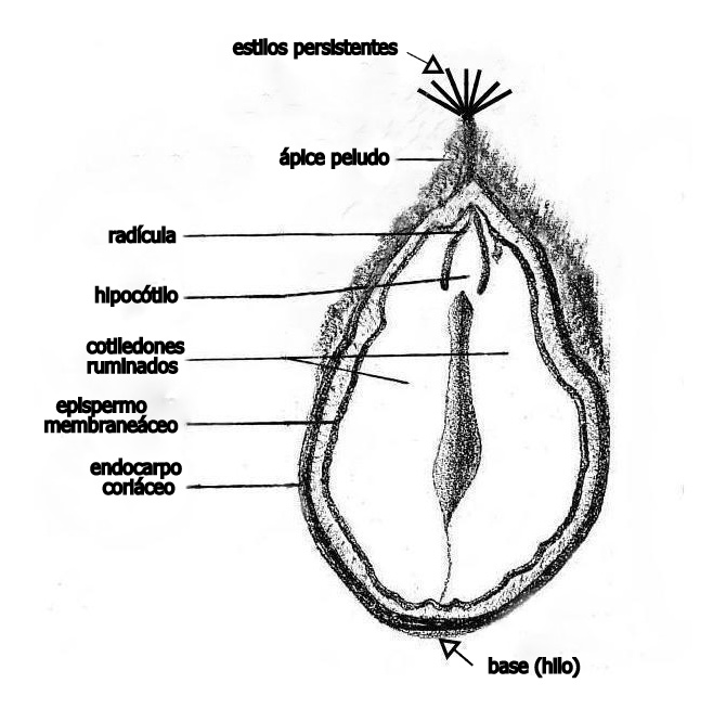 Castanea (Castaño) : Corte longitudinal de una castaña, con sus componentes.